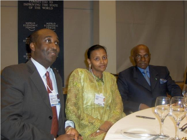 Mr et Mme Bayero Fadil et le Président du Sénégal Abdoulaye Wade